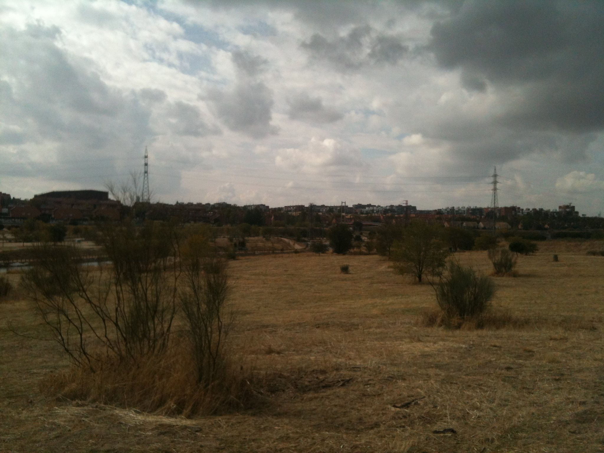 Panoramica Parque de las Presillas